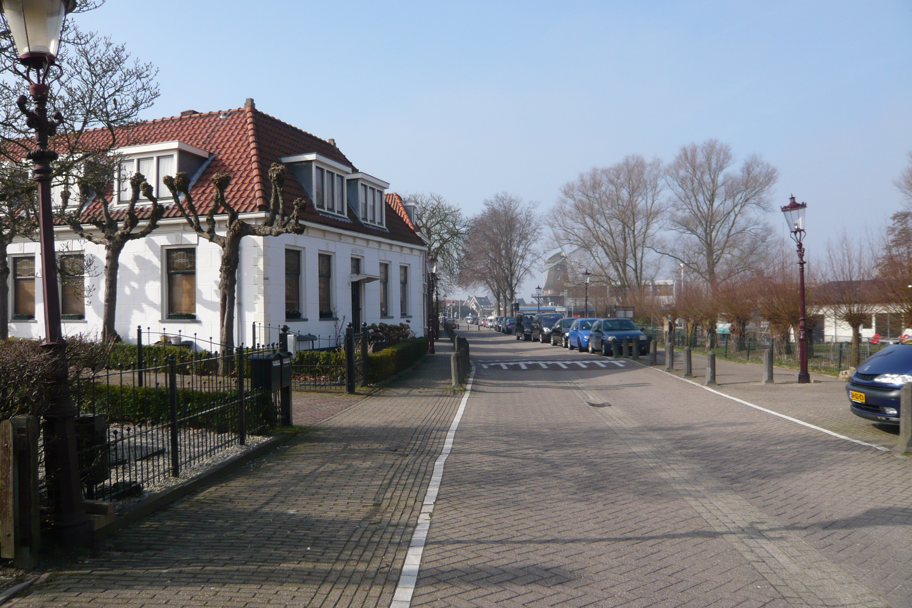 Aker-Stein, Sloterweg, Sloten, Amsterdam, MIP object 36041